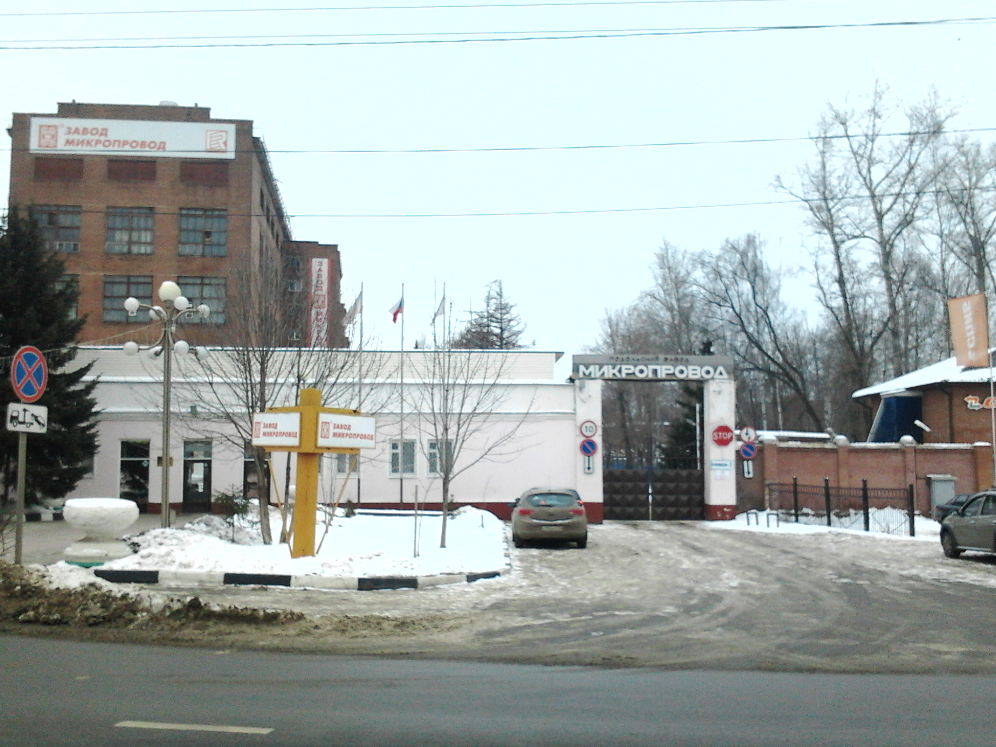 проходные и корпус предприятия